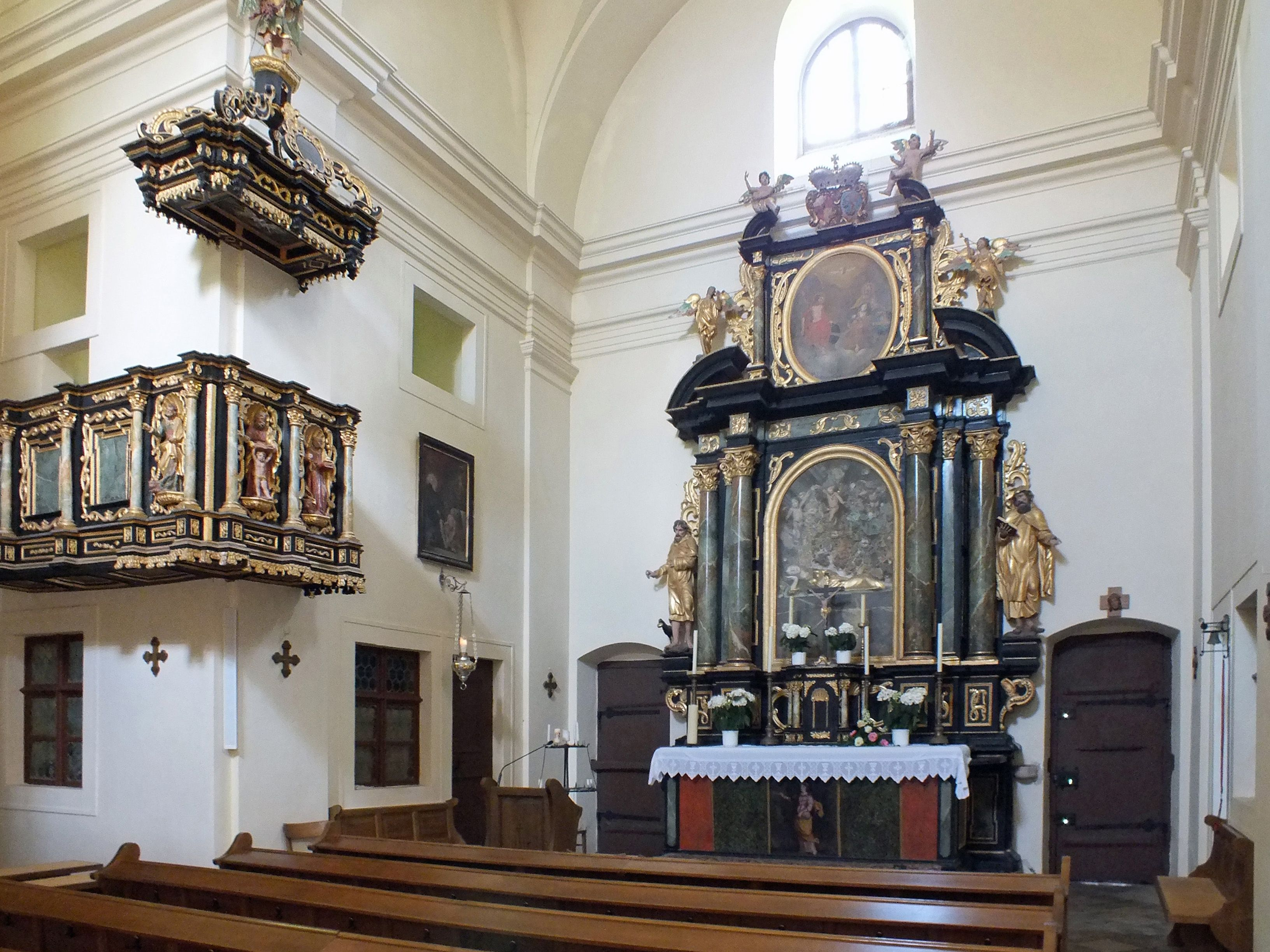 Rosalienkapelle Forchtenstein, Hauptaltar und Kanzel